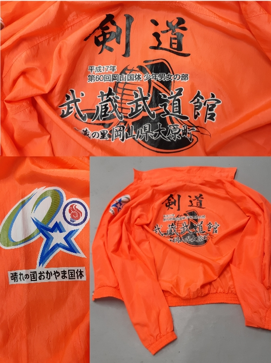 Blouson de kendoka remis en 2005, au Budokan Miyamoto Musashi